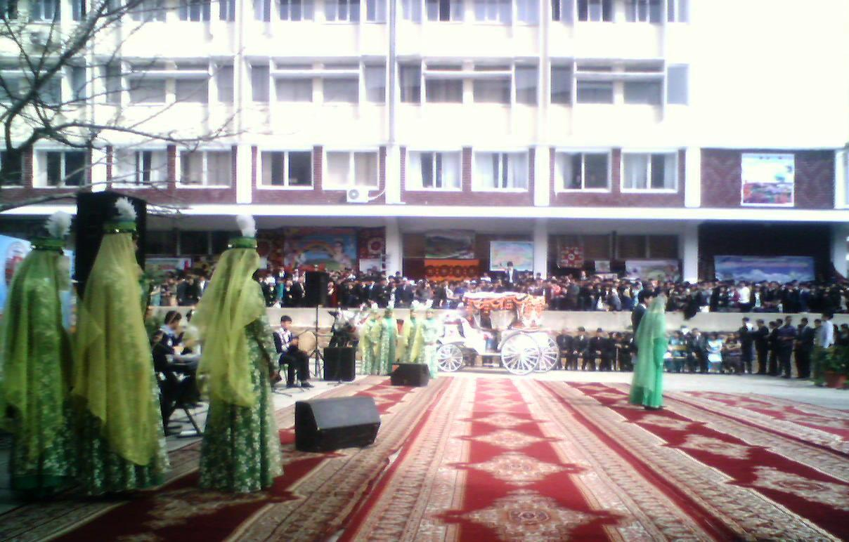 Празднование "Навруз-2013" в Душанбе (Таджикистан) - - празднование в ТНУ г. Душанбе